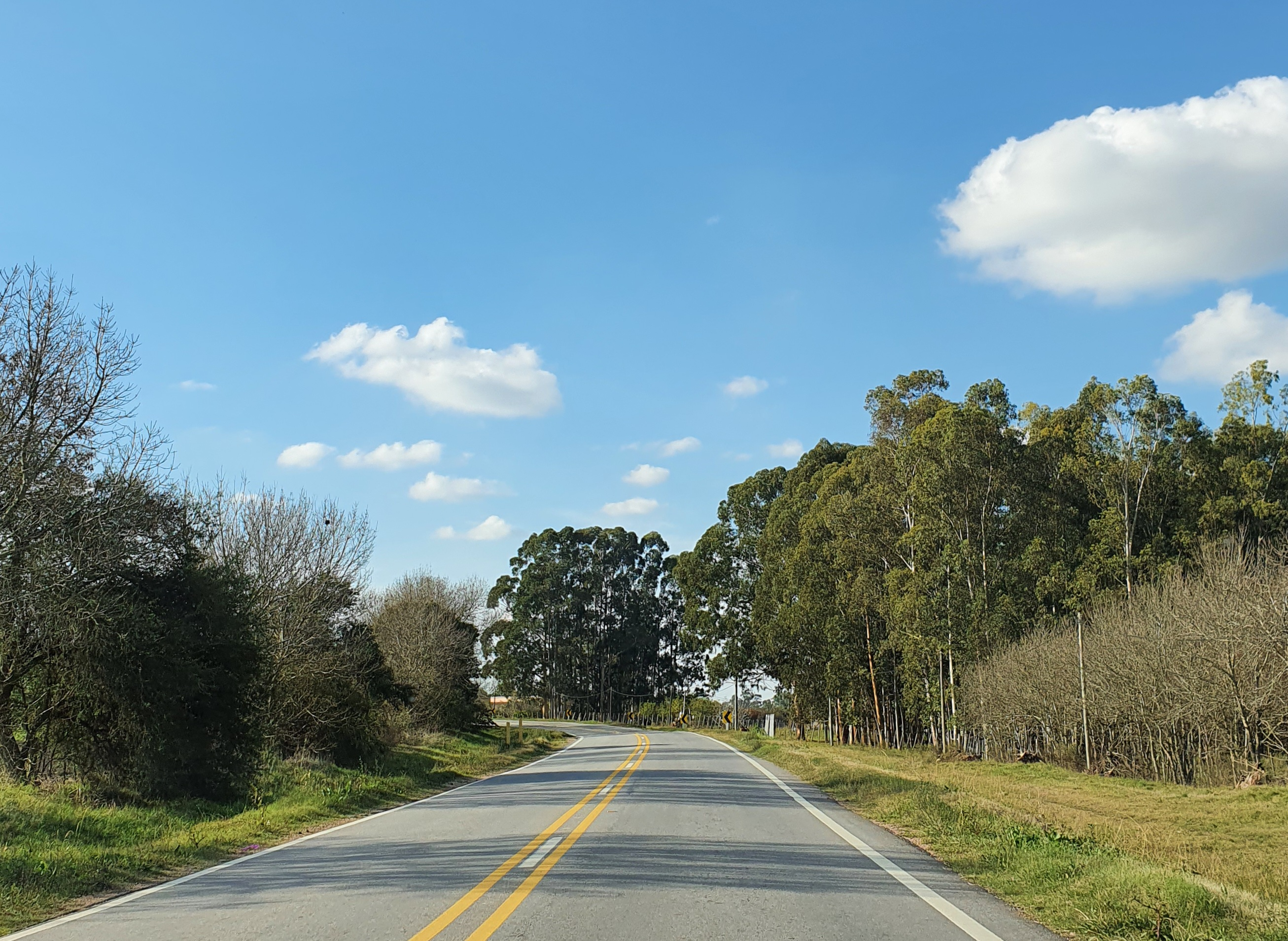 Ruta 46 km 43. Uruguay